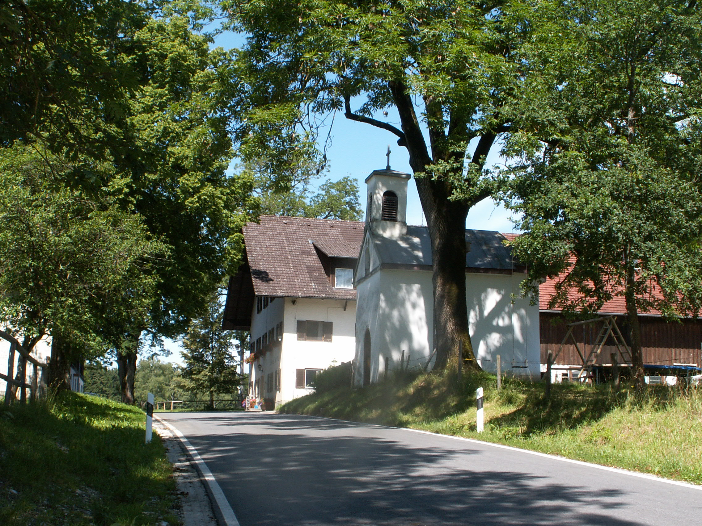 Kapelle in Hohenkasten, Eberfing